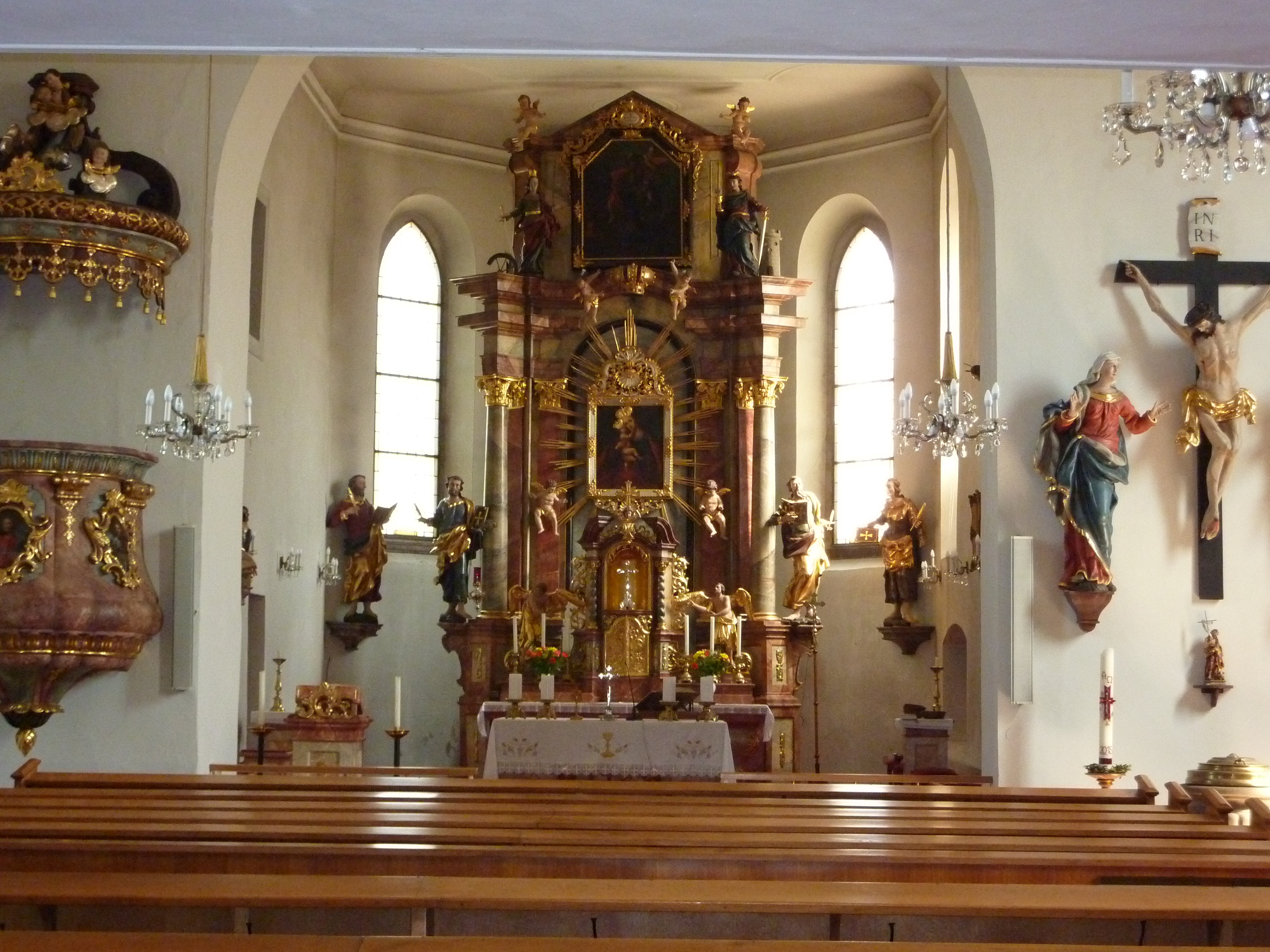 Pfarrkirche hl. Martin, Martinstraße, Abstetten, Sieghartskirchen, Niederösterreich